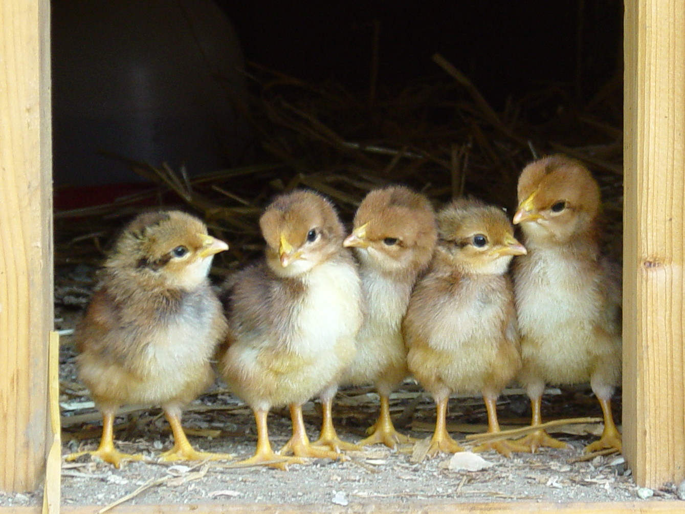 Küken vor dem ersten Ausflug